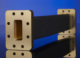 գդֆգդֆ